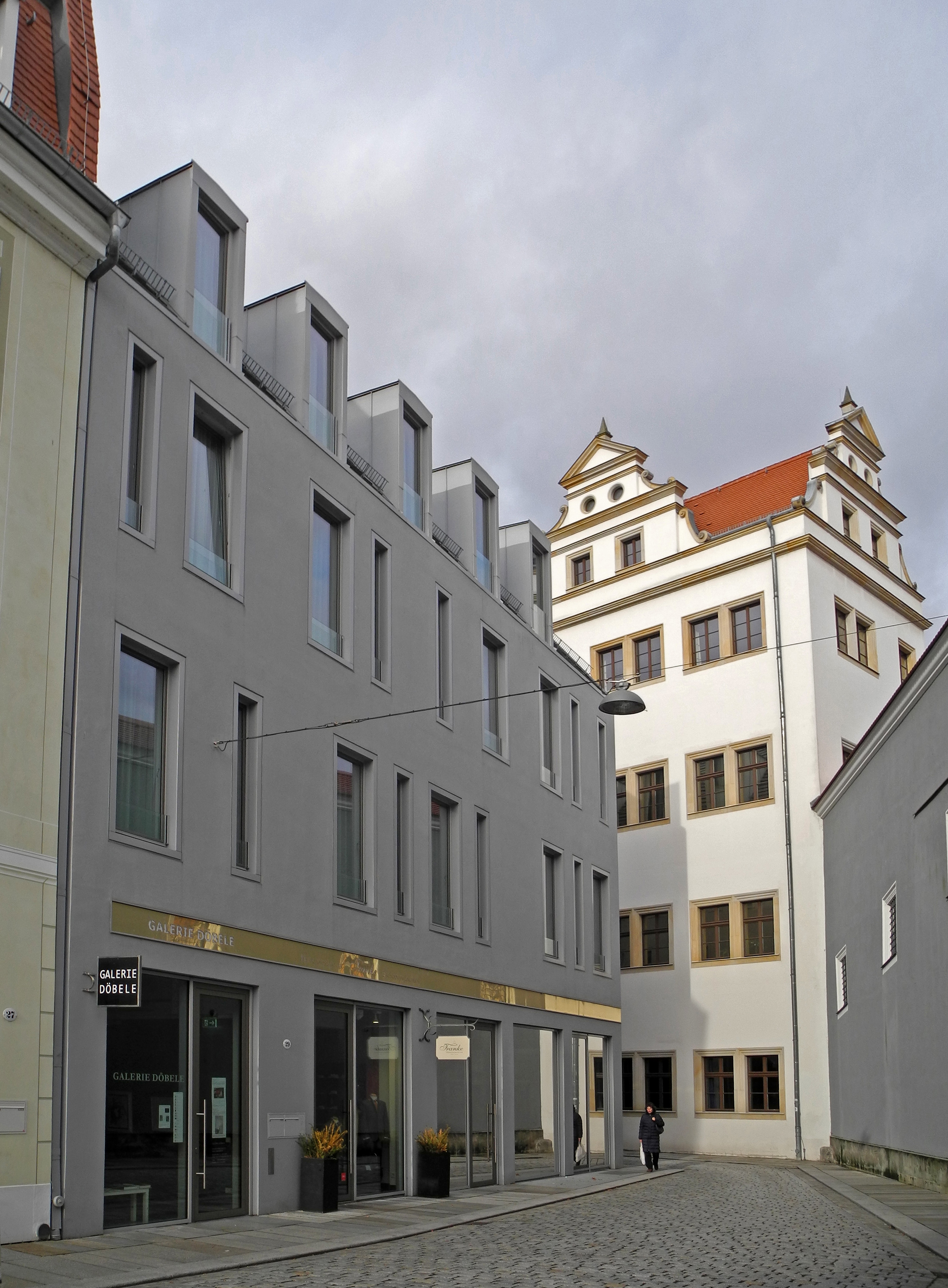 Dresden, Innere Altstadt, Eckhaus Schössergasse 29 Ecke Kanzleigäßchen. Standort des ehem. Zechschen Hauses, siehe [1], [2] und [3].